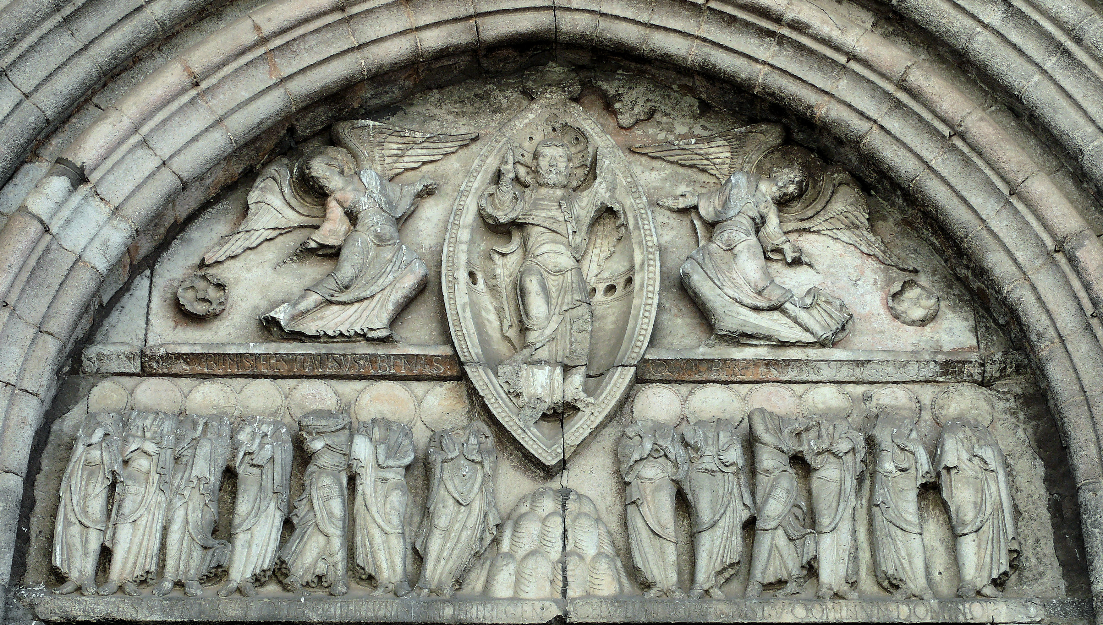 Mauriac - Basilique - Façade occidentale - Tympan